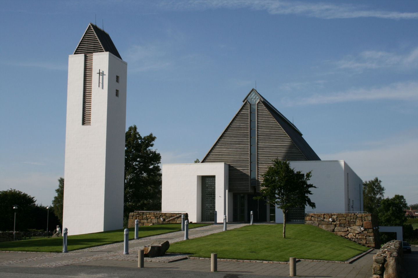 Undheim kapell, Rogaland